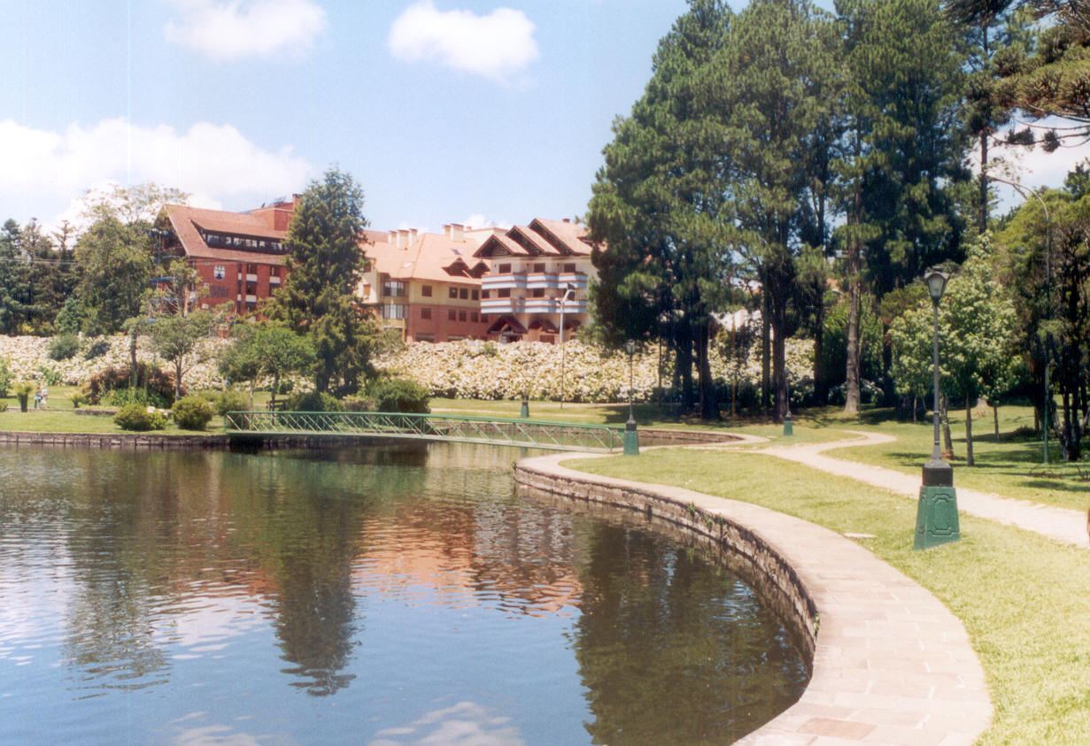 Lago Joaquina Ritta Bier